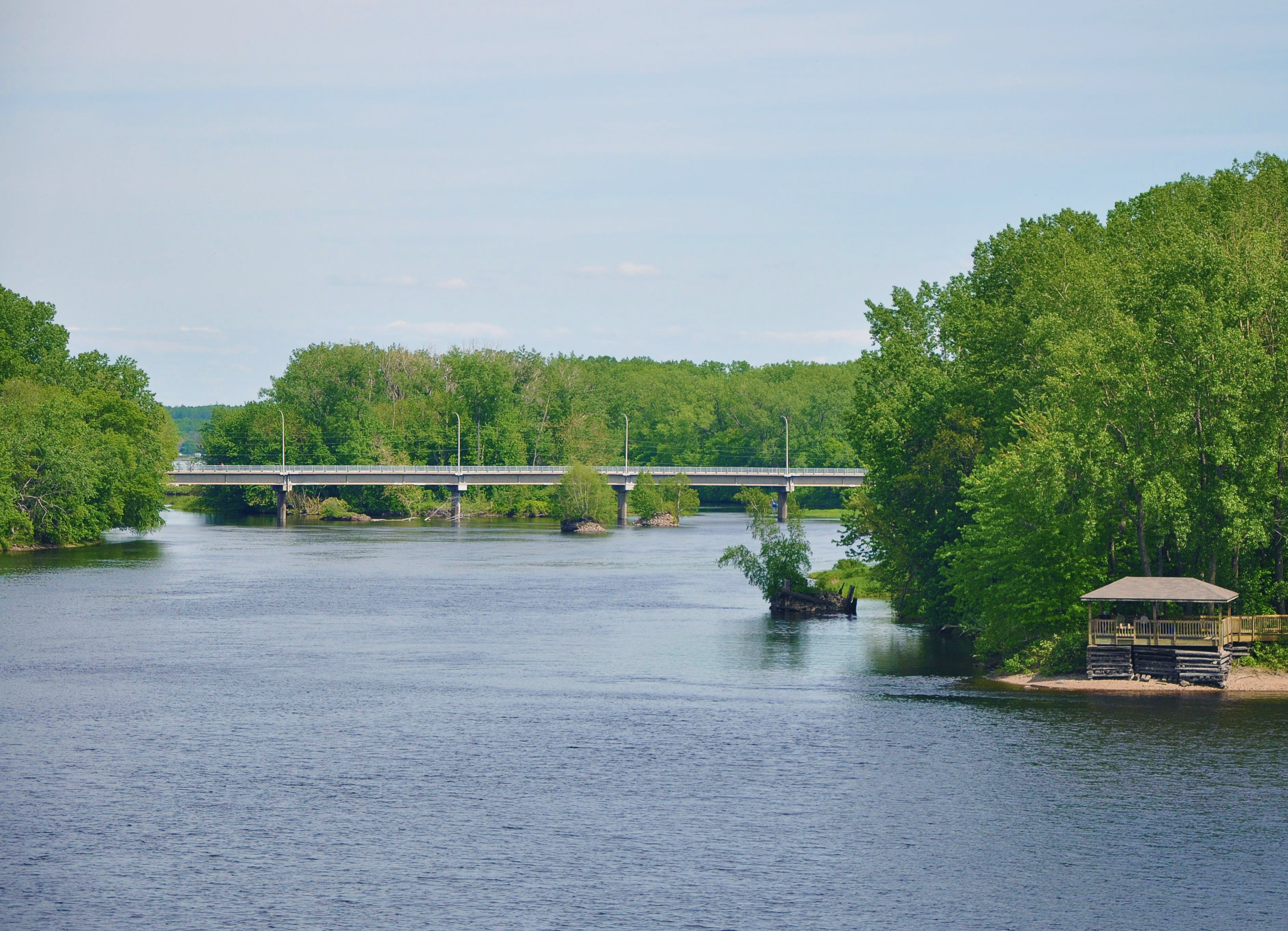 Rivière Saint-Maurice, Québec.